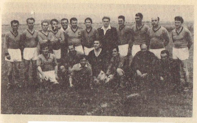 Футболният отбор на село Долни Раковец - околийски първенец през 1952 г. Отдясно наляво: Георги Човански - капитан, Иван Андонов, Димитър Вампирски, Васил Михайлов, Анани Ананиев, Лазар Шадов, Васил Соколов, Кирил Еврейски, Йордан Агин, Здравко Вампирски, Владимир Божков